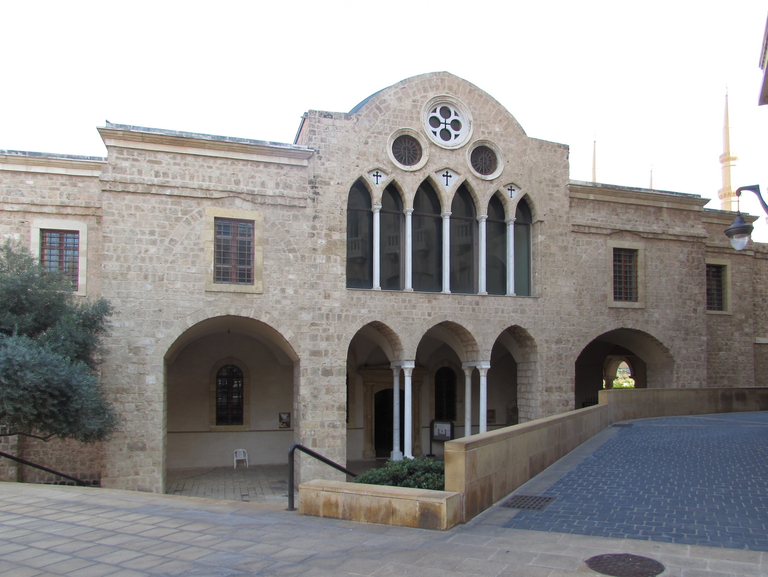 die griechisch-orthodoxe st. georgs kathedrale in beirut am nejmeh-platz